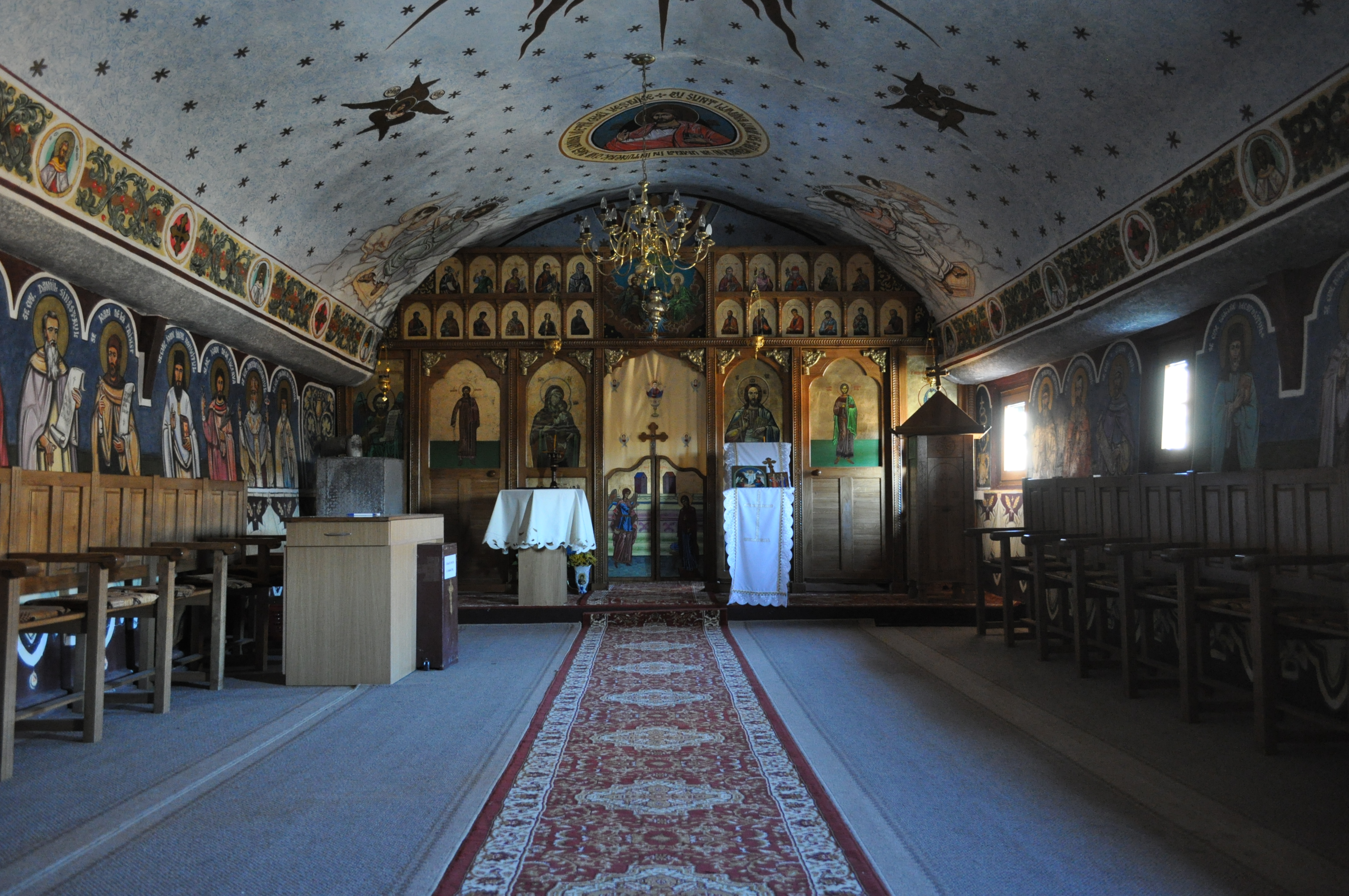 Biserica de lemn din Șilea mutată la Mănăstirea Fărău